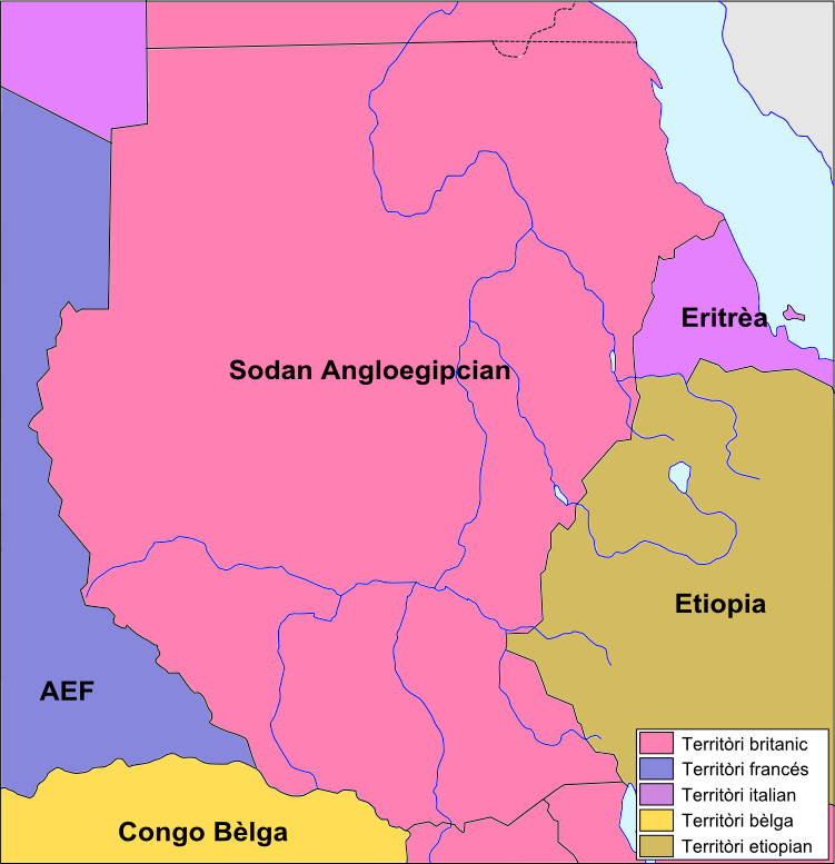 Sodan coloniau e regions vesinas.